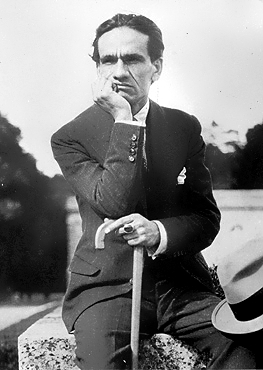 fotografia de César Vallejo en el Parque de Versalles